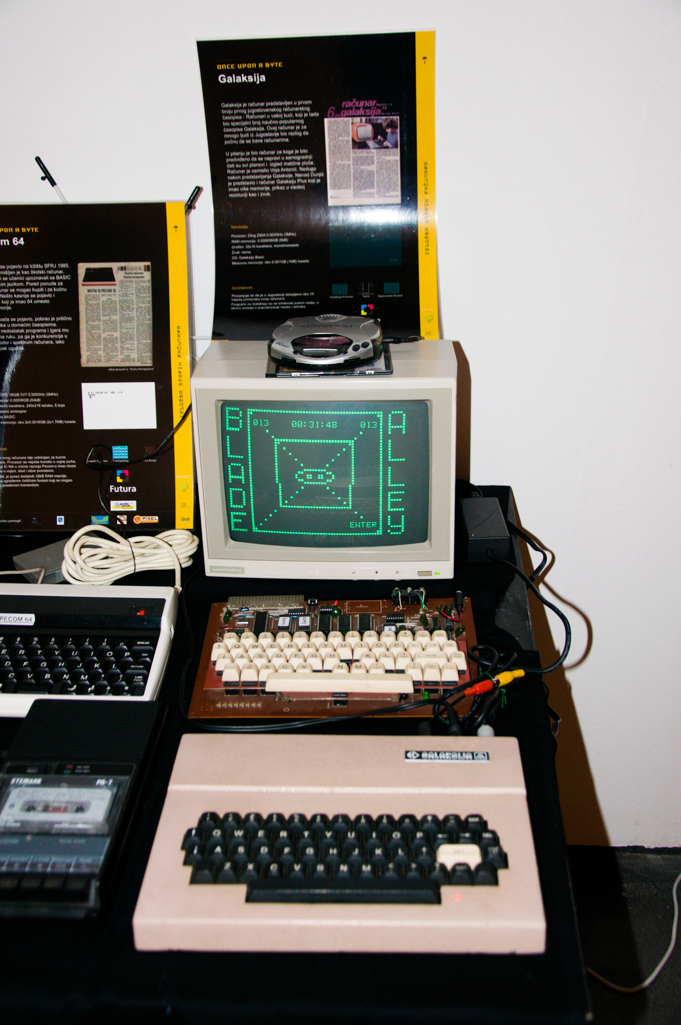 Galaksija computer at BalCCon2k14 Novi Sad, Serbia September-2014